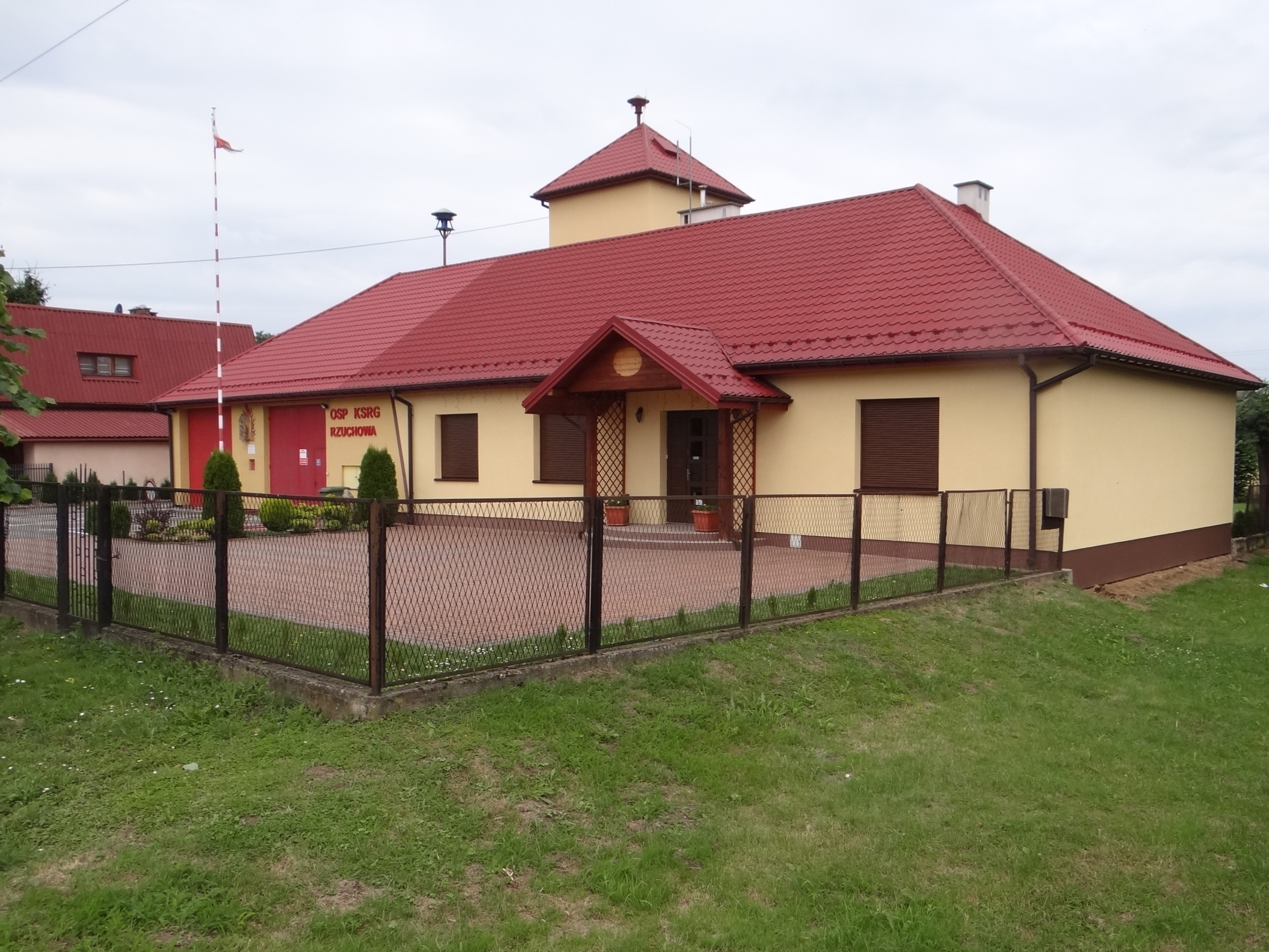 Rzuchowa. Remiza OSP